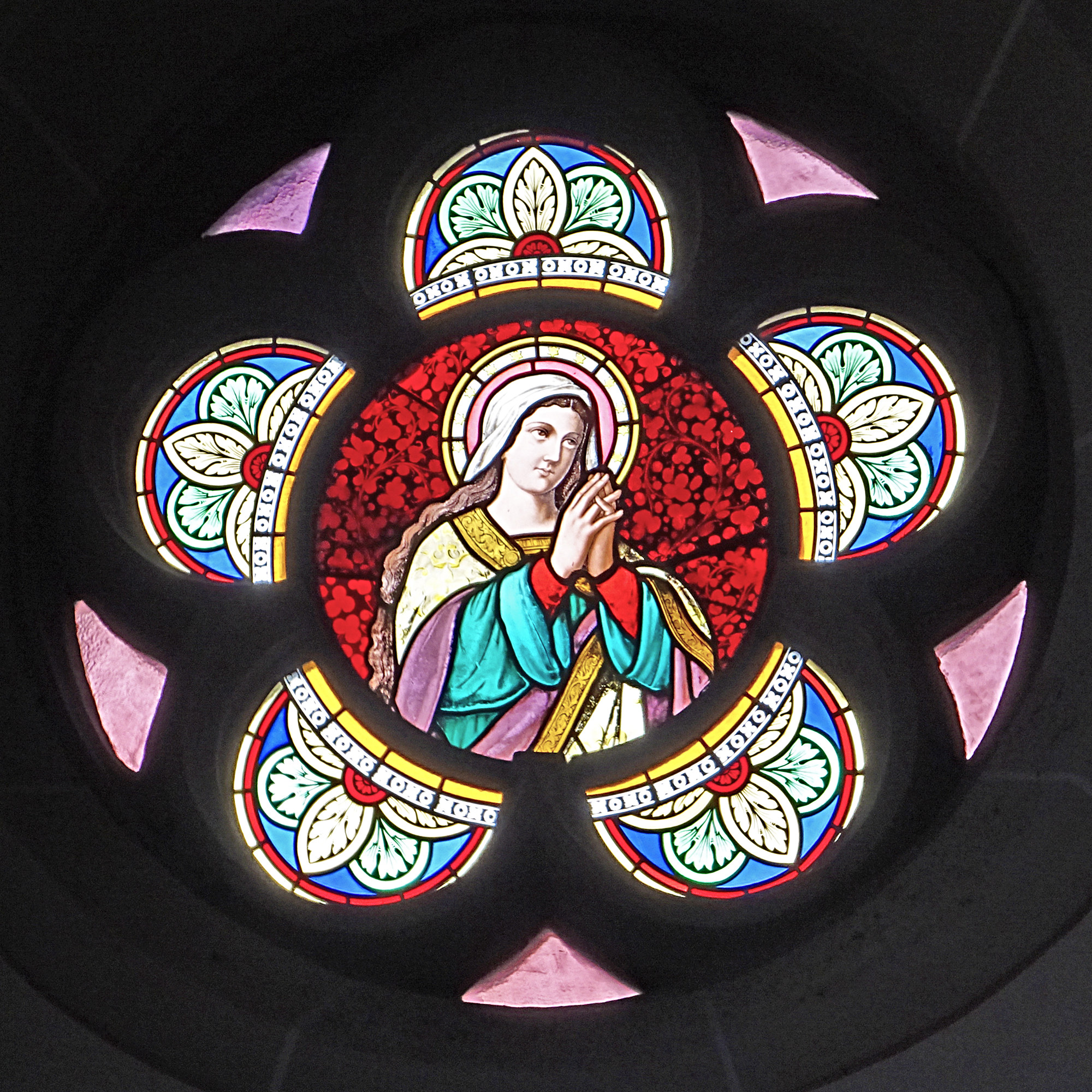 Buntglasfenster in der Pfarrkirche St. Maria Magdalena (Leinefelde)